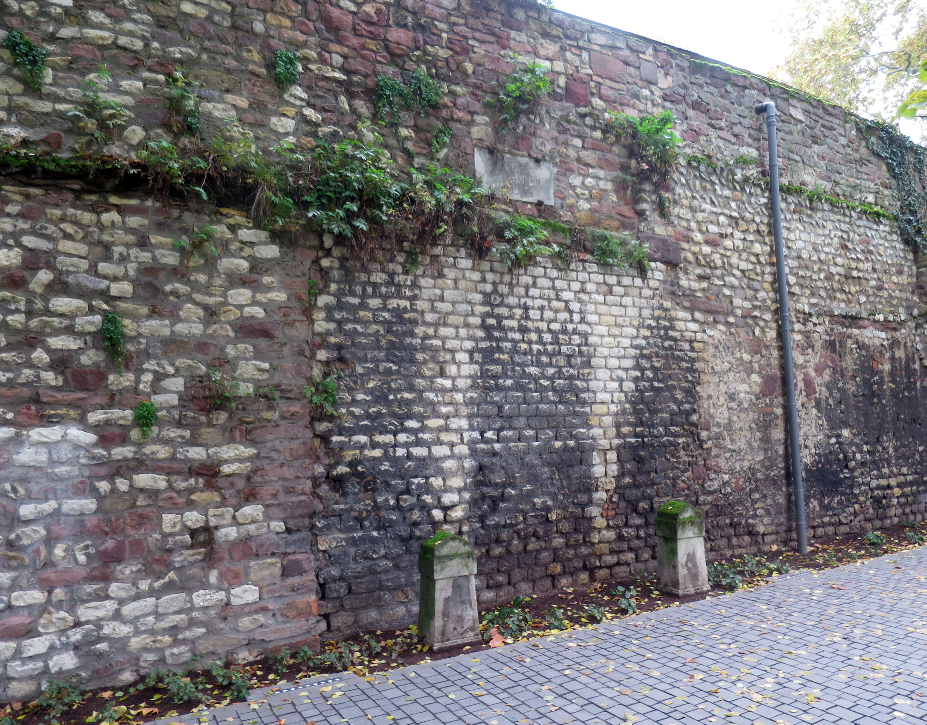 Römerzeitlicher Mauerabschnitt in der westlichen Stadtmauer von Worms